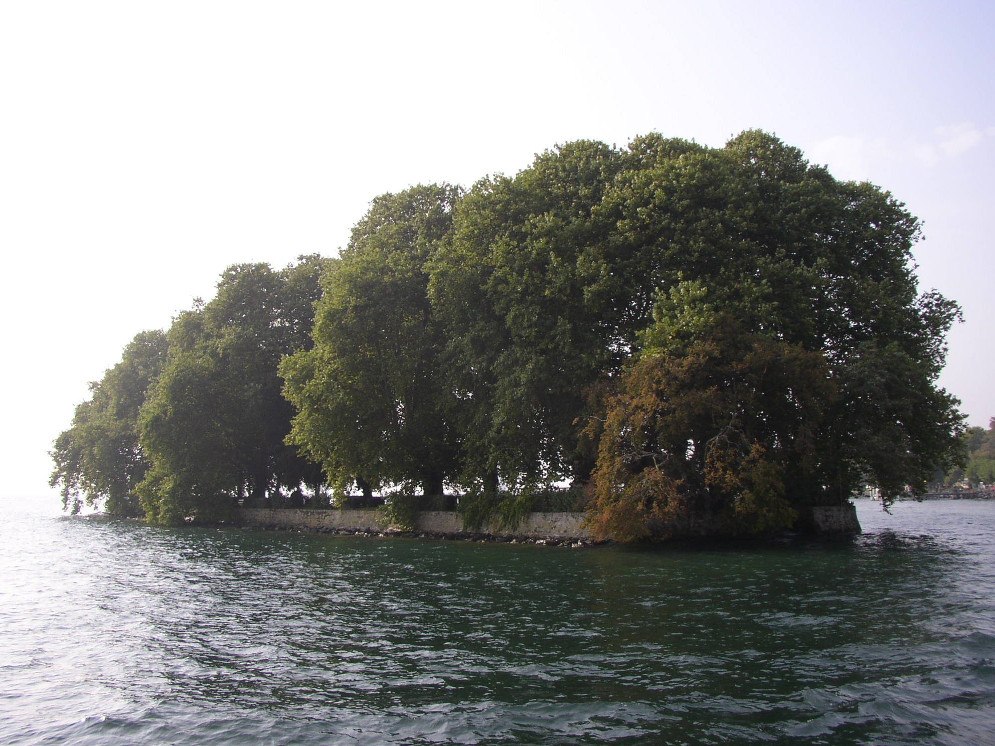 L'Île de la Harpe, au large de Rolle, sur le lac Léman